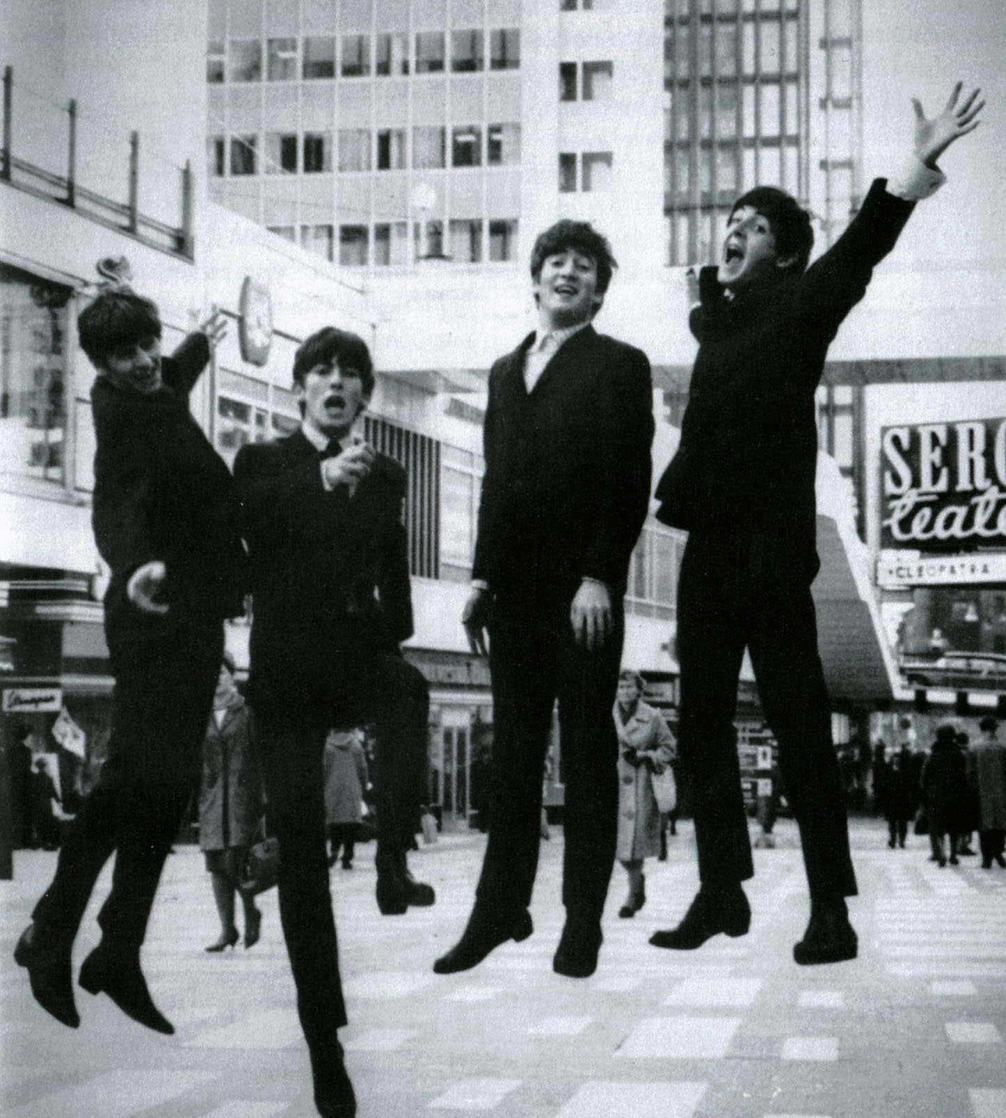 The Beatles i Hötorgscity, Stockholm 1963